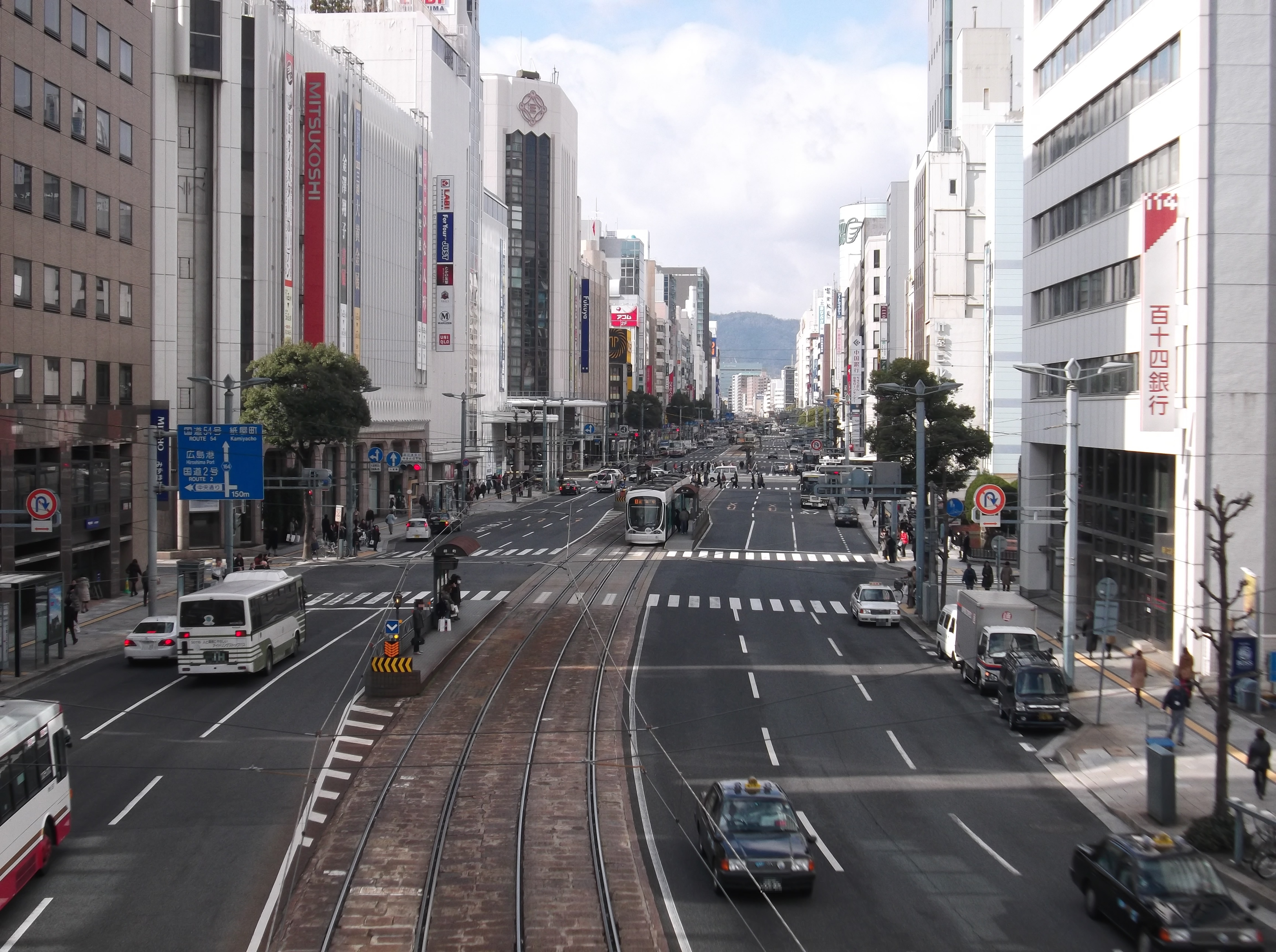 広島相生通りを胡町の歩道橋から撮影